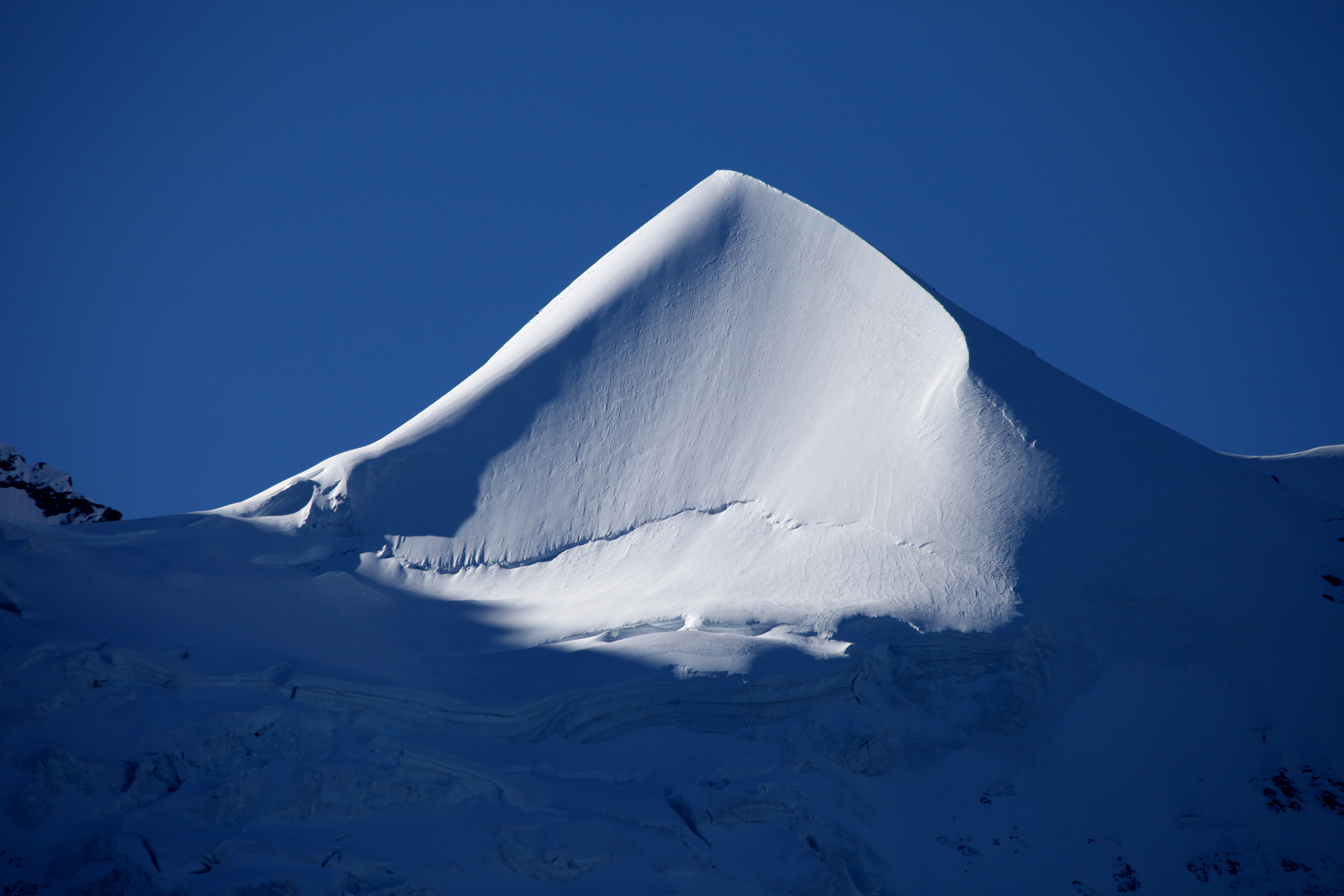 L'arête neigeuse du Silberhorn.